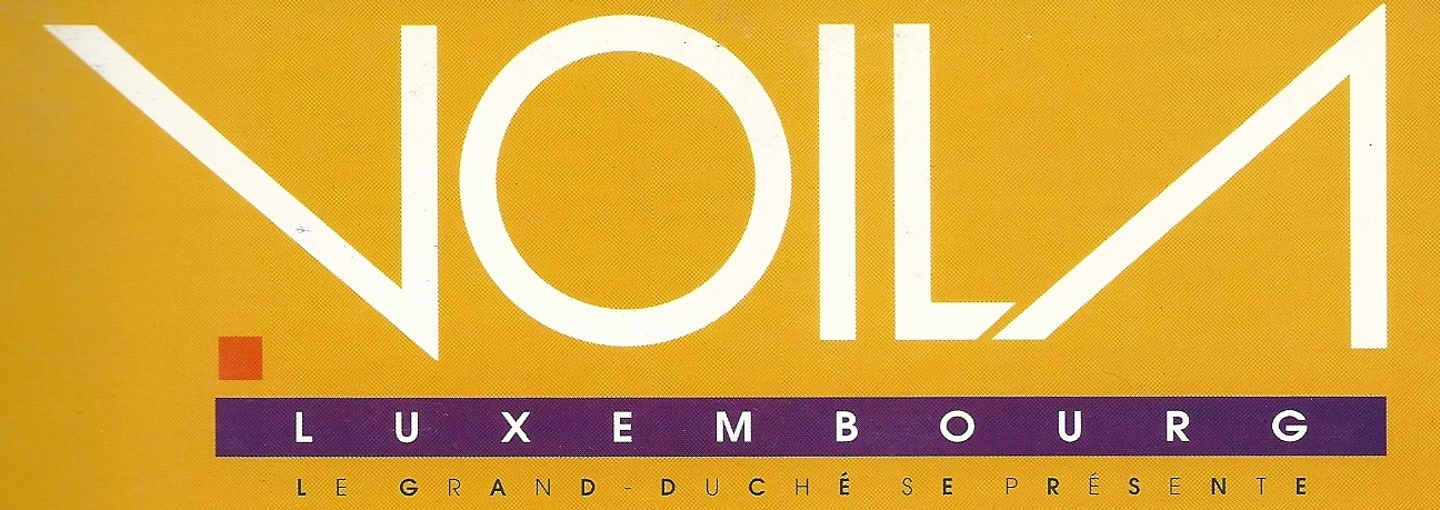 Scan vum Titel vun der Zäitschtrëft "Voilà Luxembourg" (Editioun 5, November 1993)